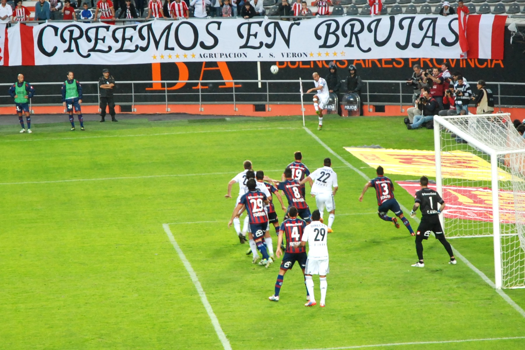 Estadio Ciudad de La Plata. Partido entre Estudiantes y San Lorenzo por la penúltima fecha del Torneo Inicial 2014. Despedida de Juan Sebastián Verón.